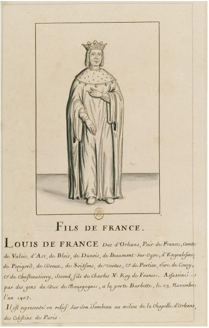 Gisant van Lodewijk I van Orléans. Monument in de nu verdwenen kapel van de Celestijnen in Parijs.